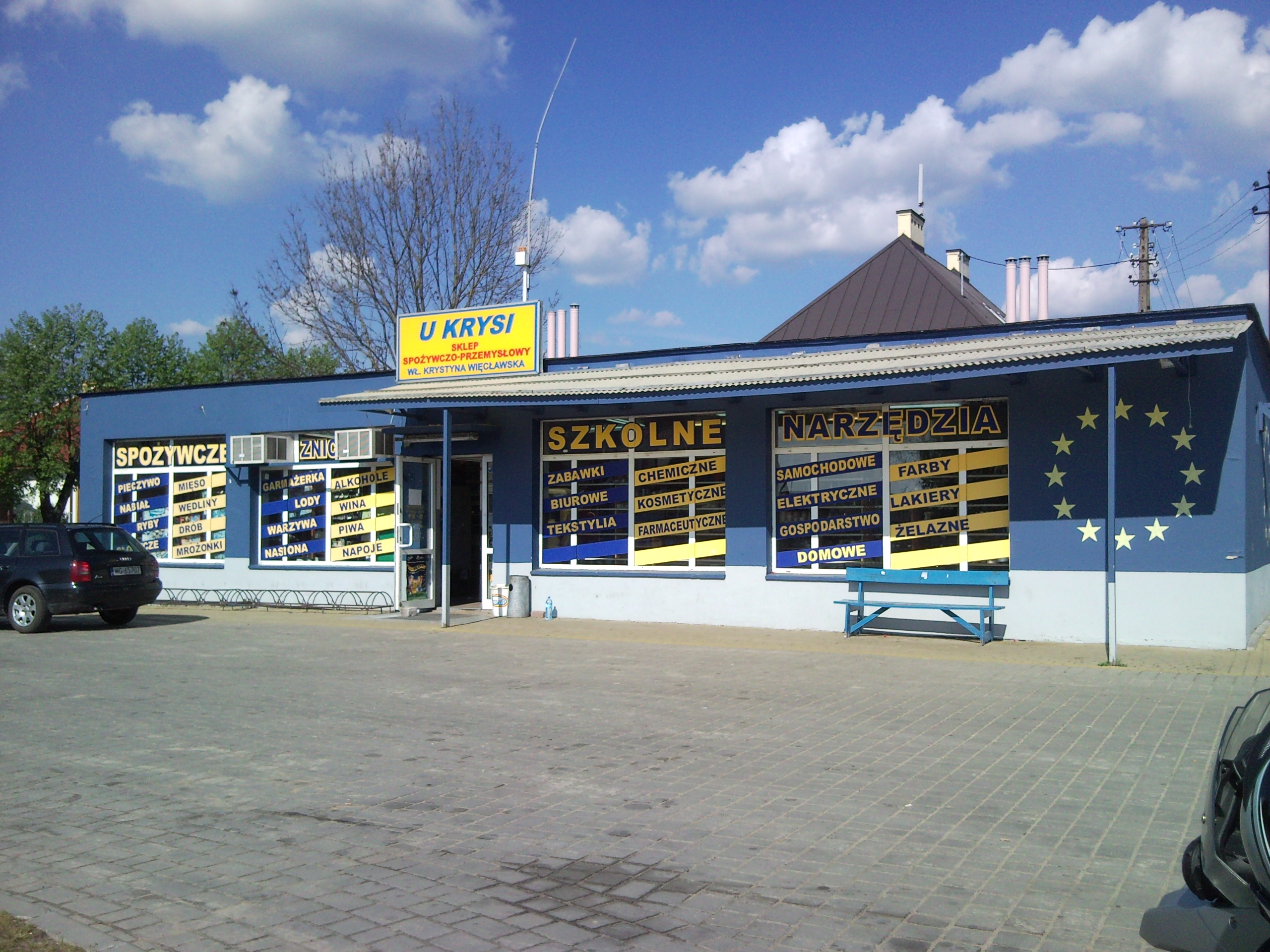 Wilkowyje "Ranczo" - Jeruzal